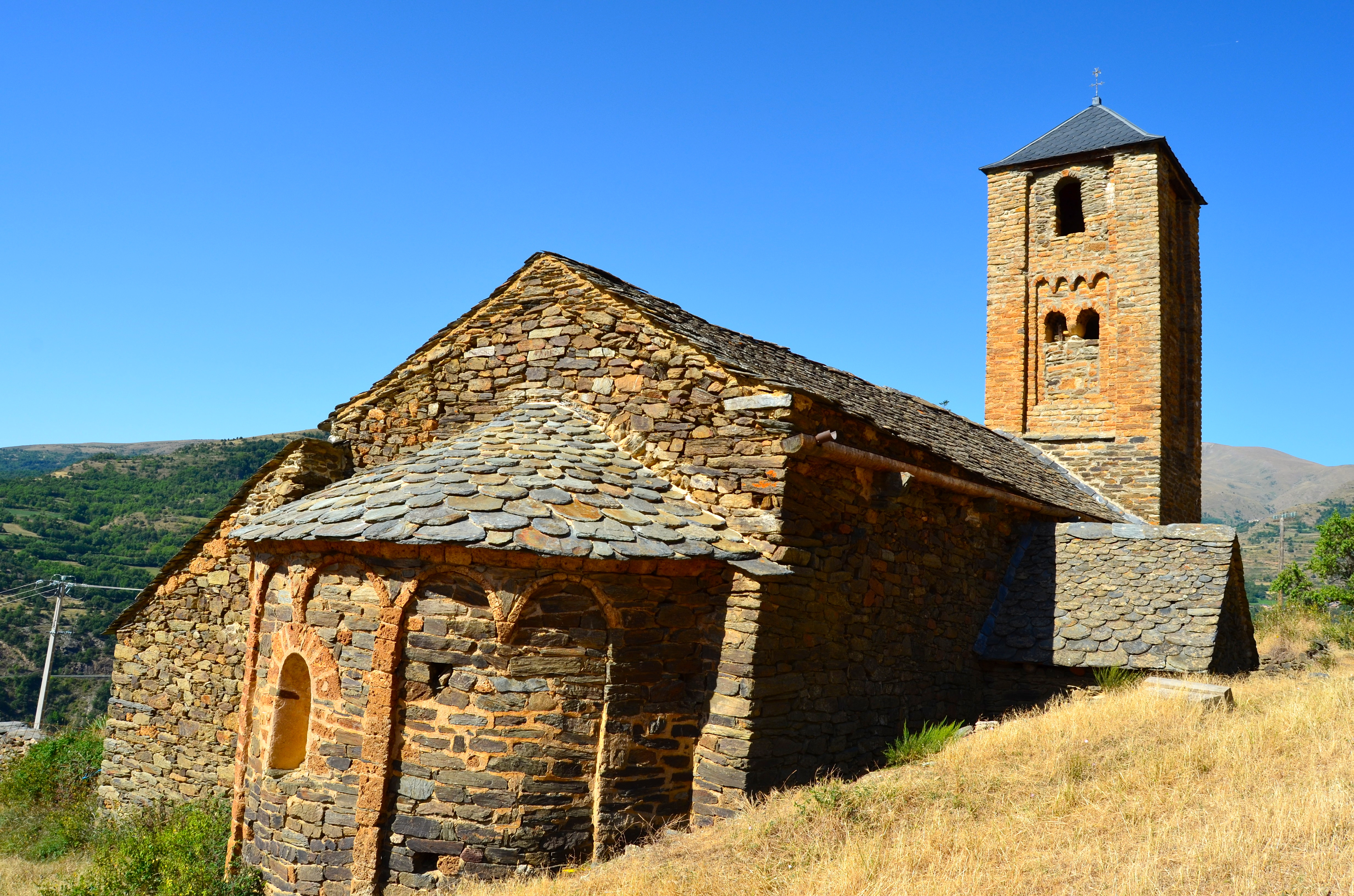 Església de Sant Iscle i Santa Victòria de Surp (Rialp)